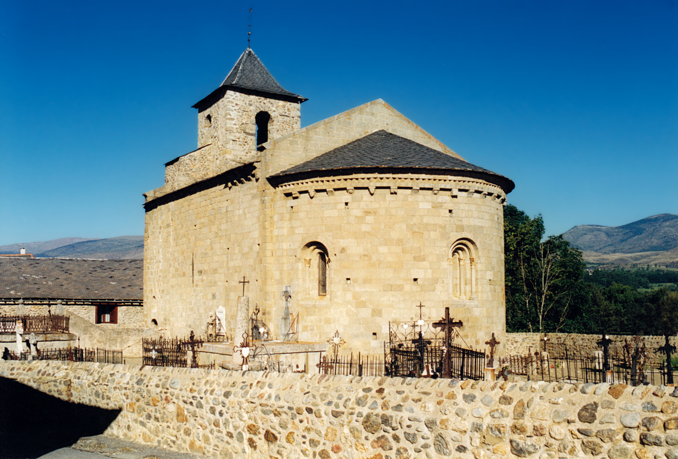 France - Cerdagne - Église Saint-Martin d'Hix